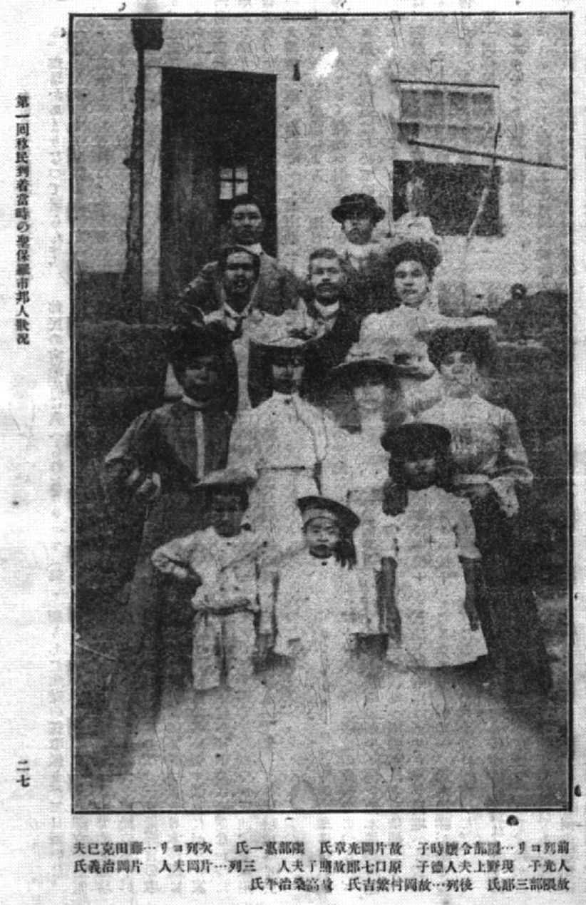 Liderados por Saburo Kumabe, um grupo de 12 colonos japoneses chegou a Conceição de Macabu em 1907 para se tornarem os pioneiros da colonização japonesa no Brasil. Esse grupo de colonos permaneceu cinco anos na Fazenda Santo Antônio, fracassando em seu projeto colonizador, mas fazendo história pelo pioneirismo do fato.